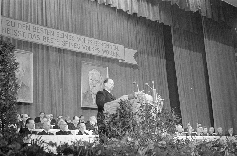 Original image description from the Deutsche Fotothek Porträt: Erich Weinert